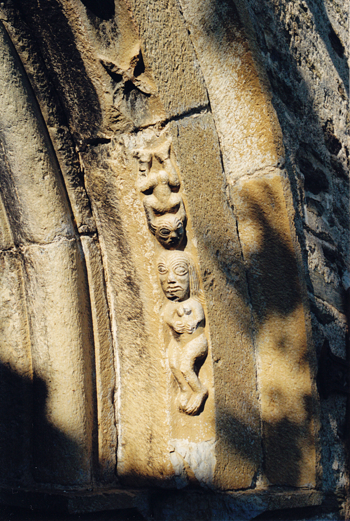 Espagne - Basse-Cerdagne - Ger - Saga - Église Sainte-Eugénie